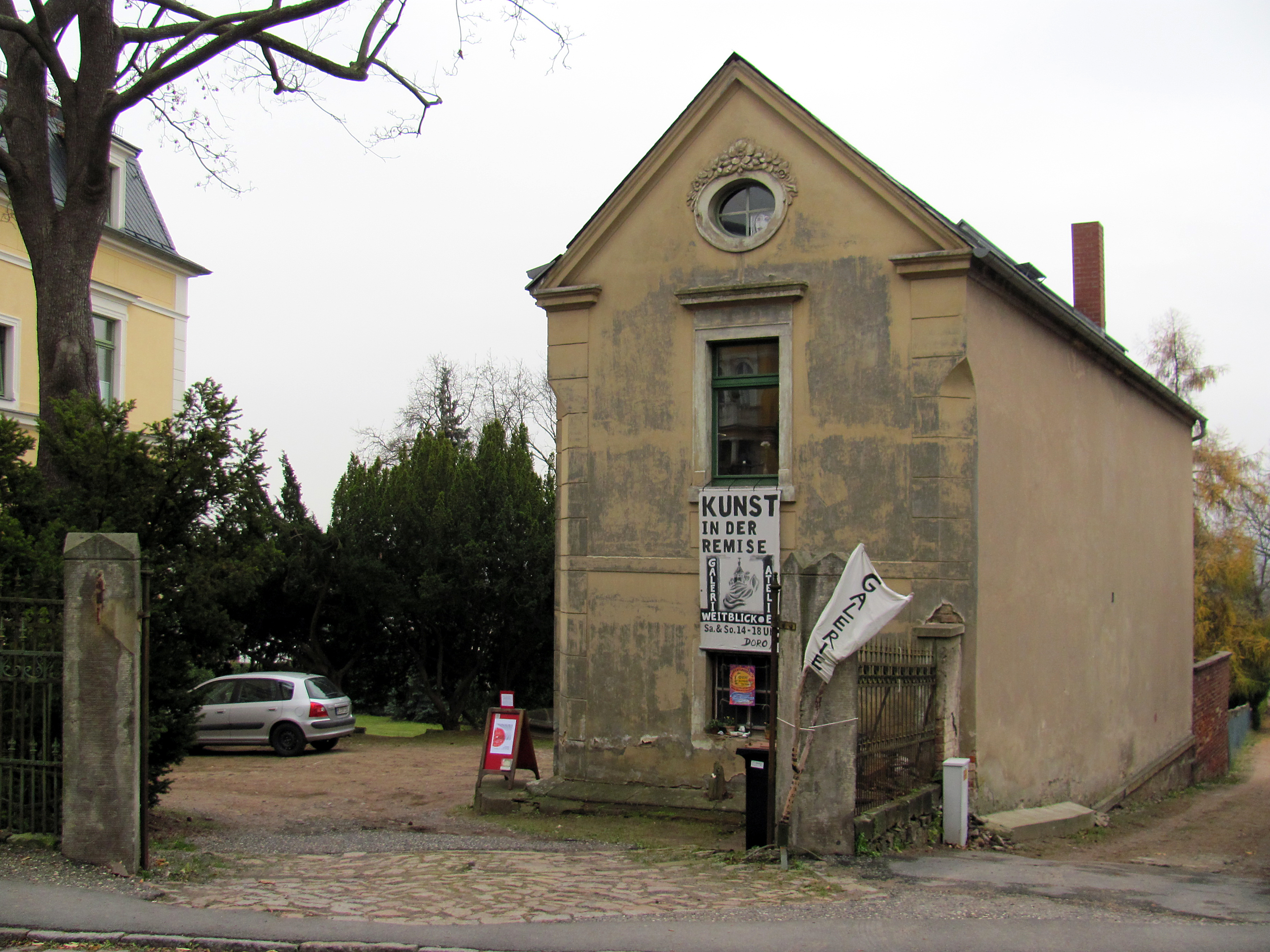 Radebeul-Niederlößnitz, Mietvilla Carl Semper: Einfahrtstor und Remise